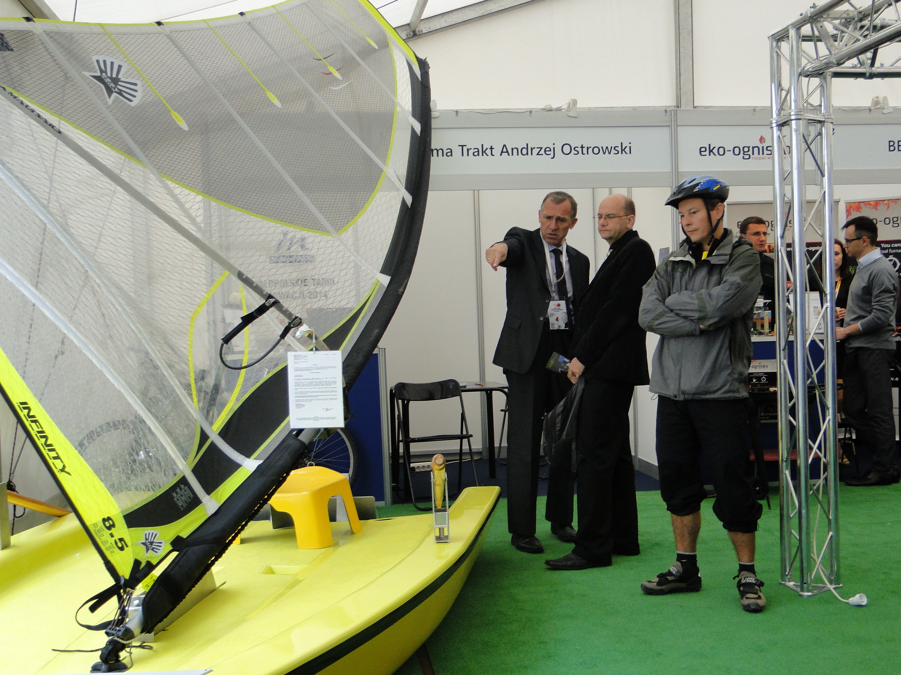 Andrzej Ostrowski ze swoją łodzią podczas Targów Innowacji w Krakowie.